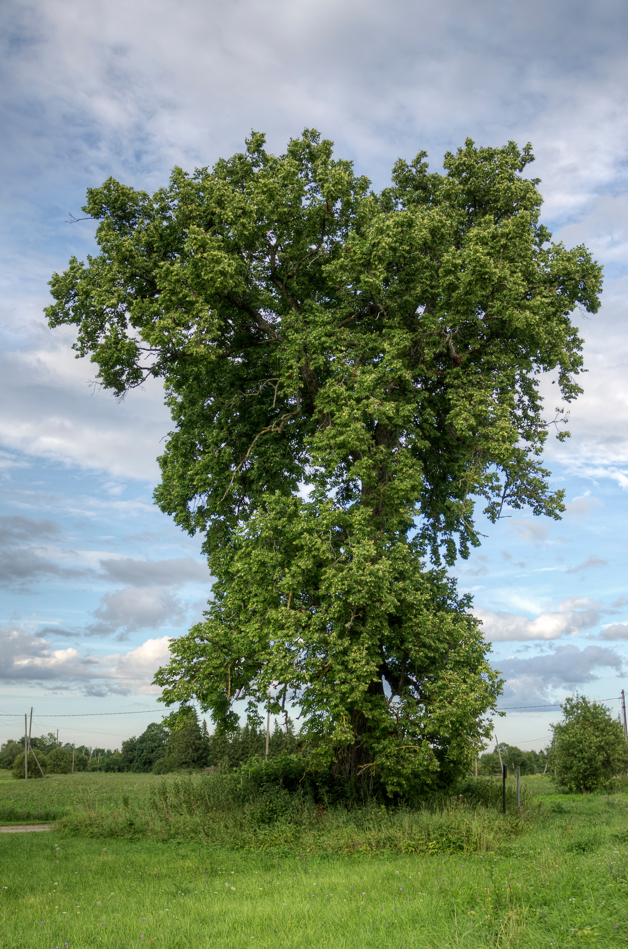 Pärn "Riinu"